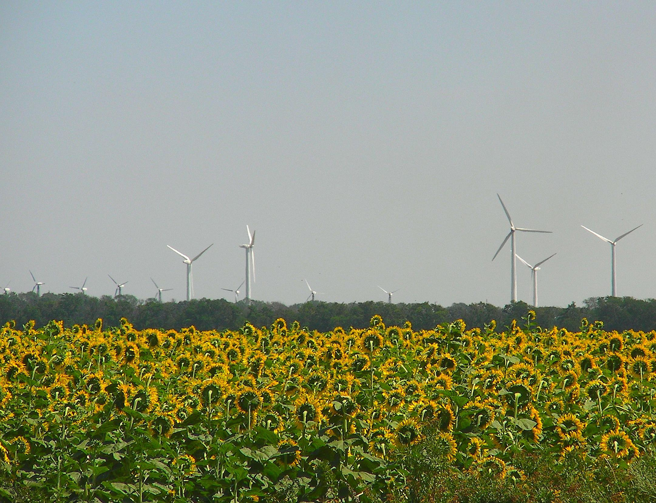 Новоазовська ВЕС - вітрова електростанція в Новоазовському районі Донецької області